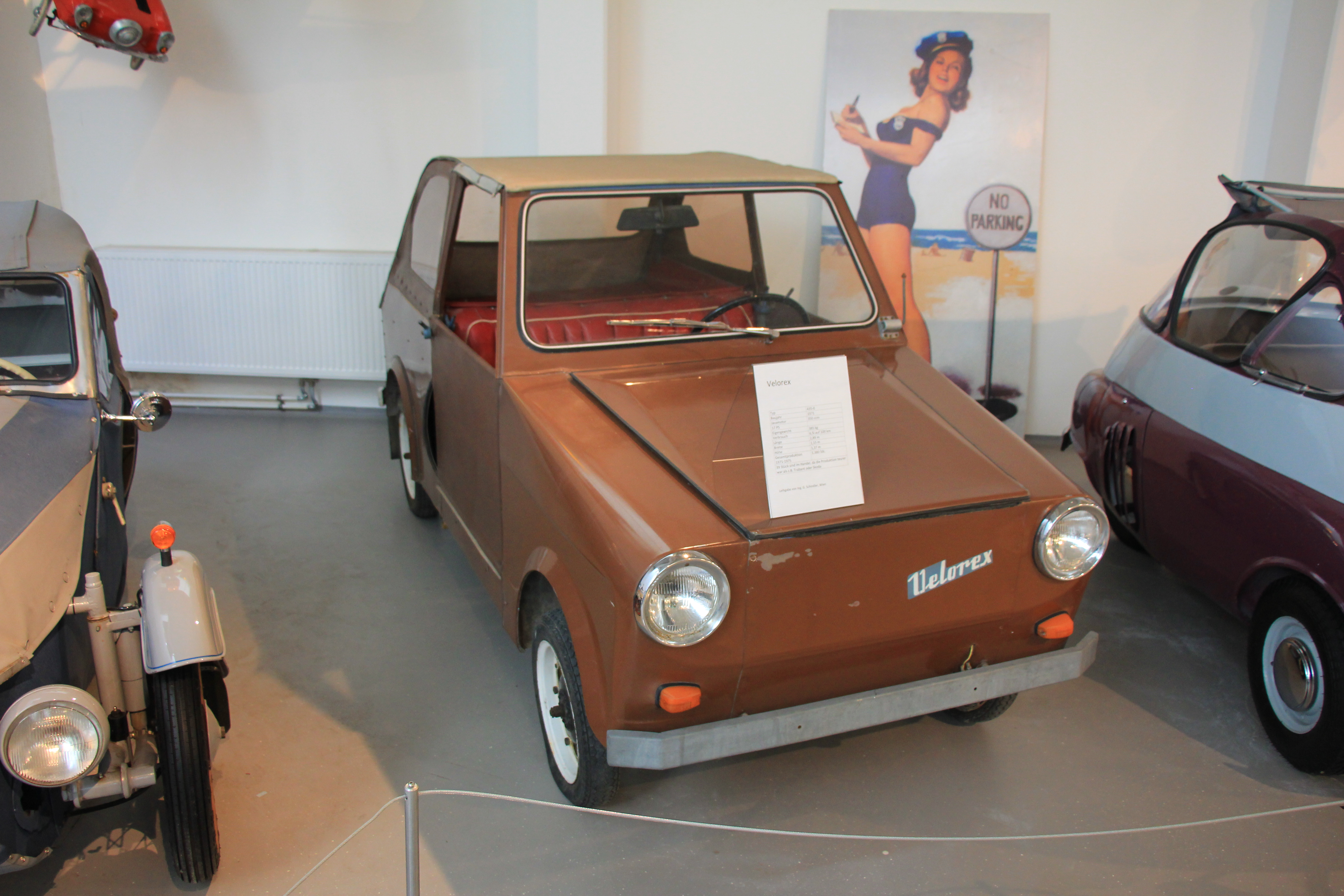 Nostalgiewelt in Eggenburg in Niederösterreich